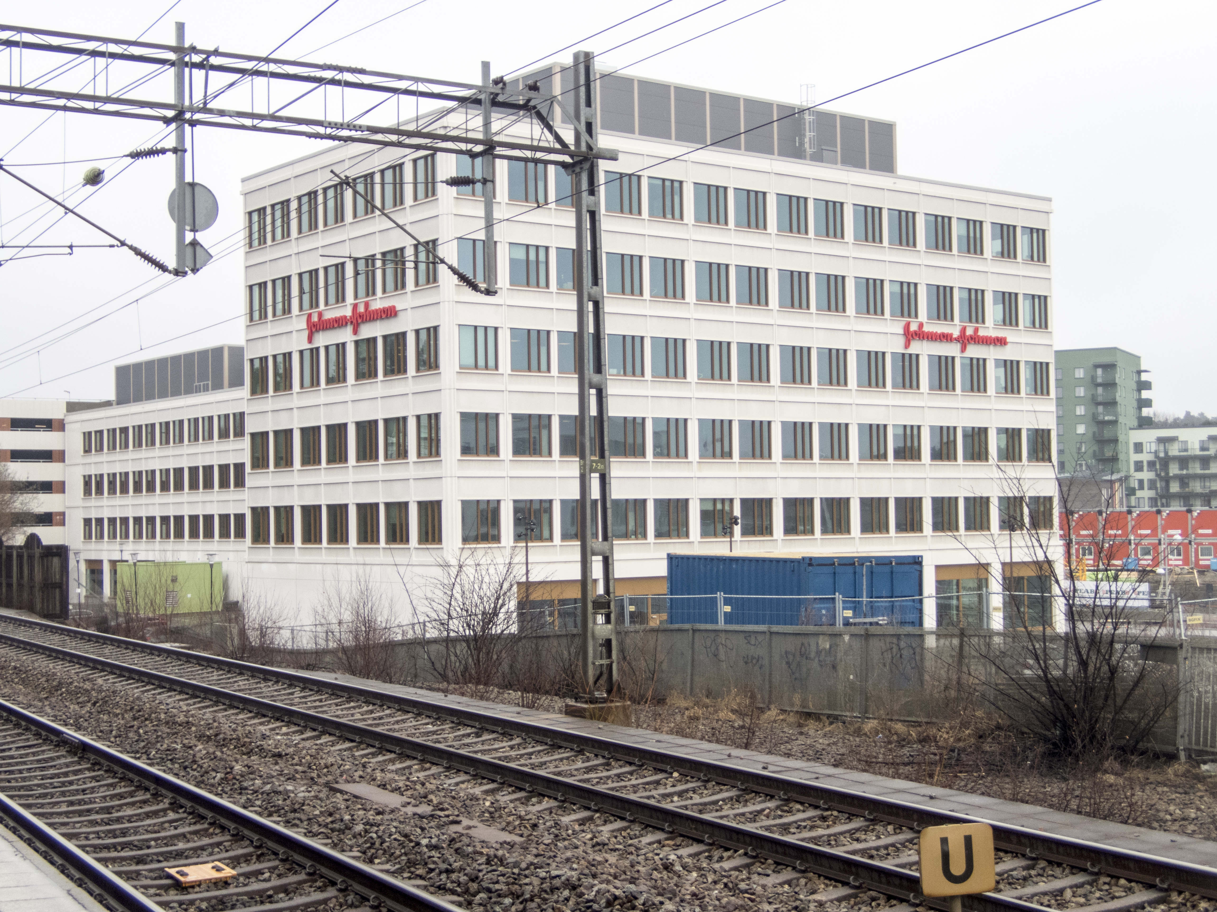 Johnson & Johnson, Nya Ulriksdal. Byggnadsår 2016. Arkitekter: Scheiwiller Svensson arkitektkontor